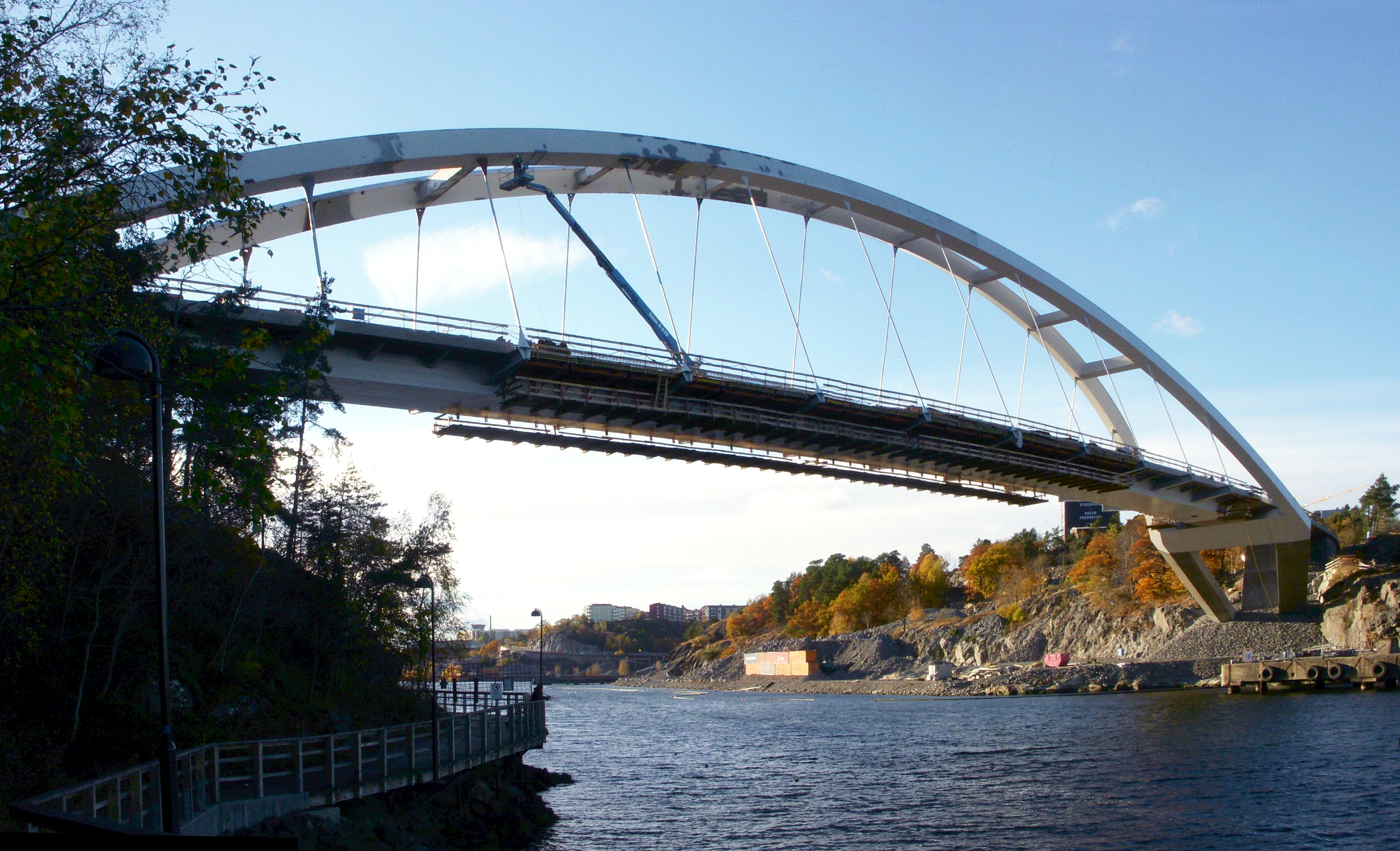 Svindersviksbron